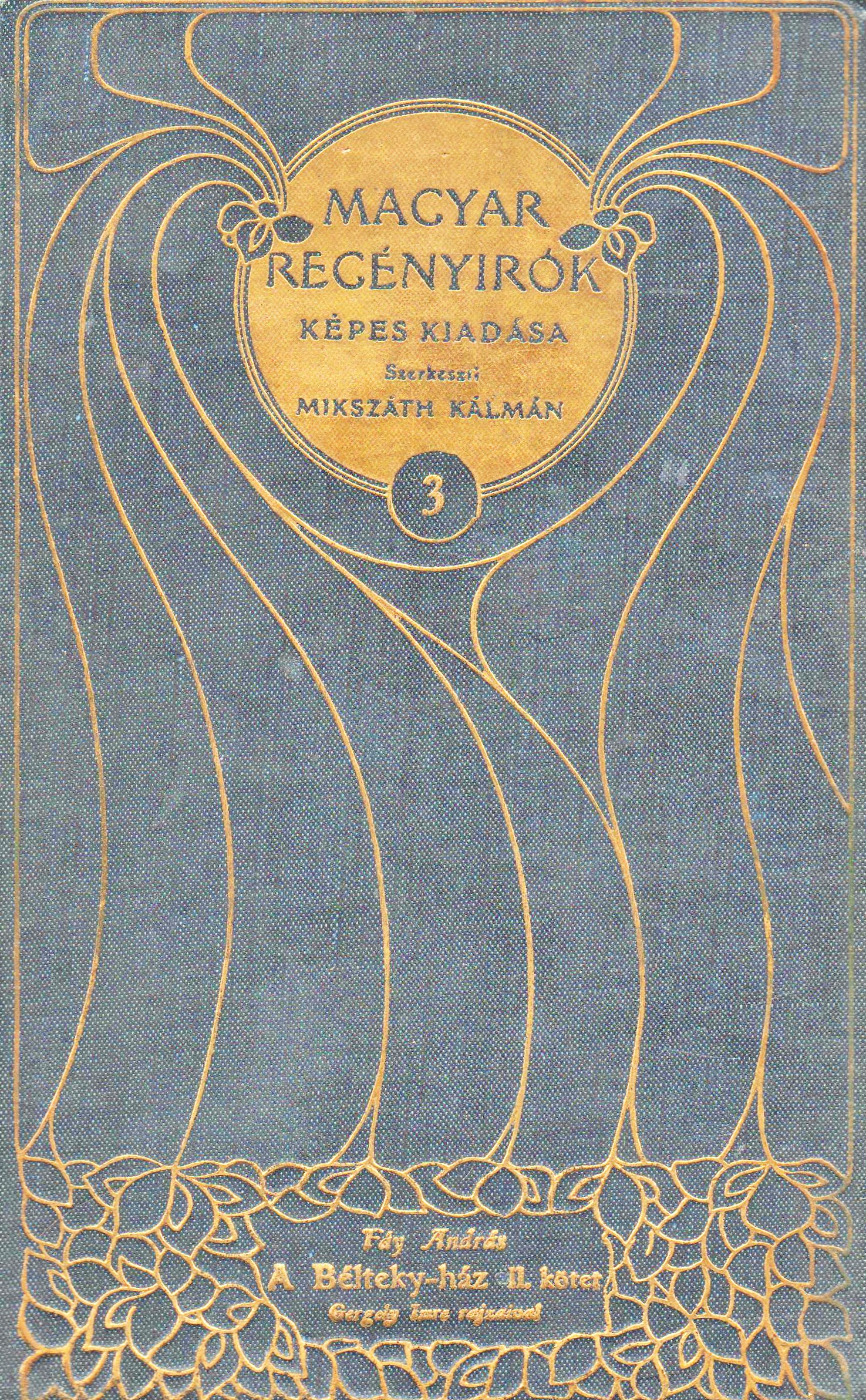 Magyar regényírók képes kiadása-könyvsorozat, borítódísz, tervező nem ismert, 1900-as évek